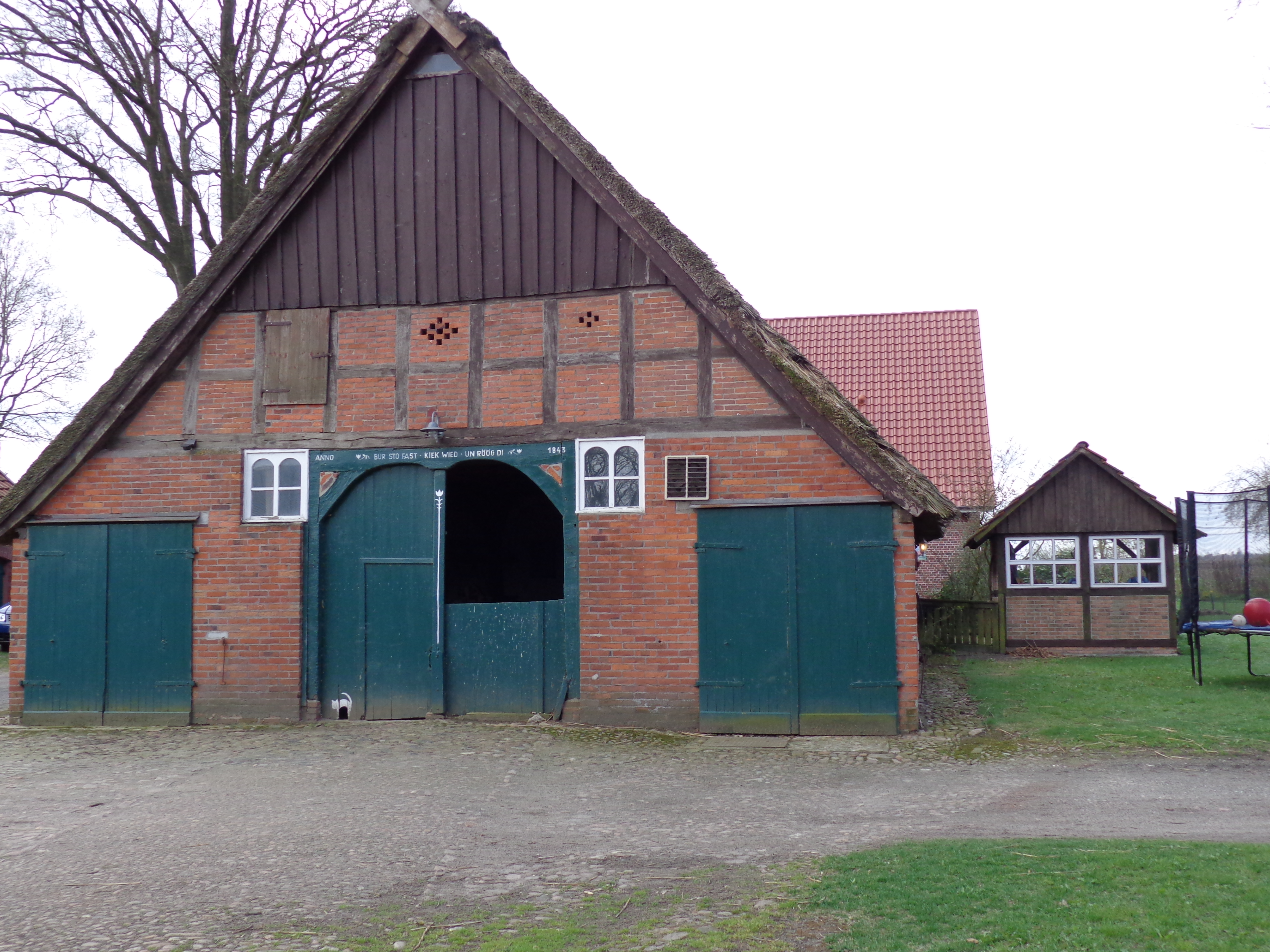 Brake 2, 27404 Heeslingen, Duitsland